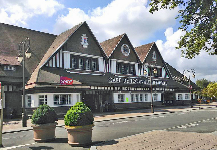 Gare SNCF de Deauville